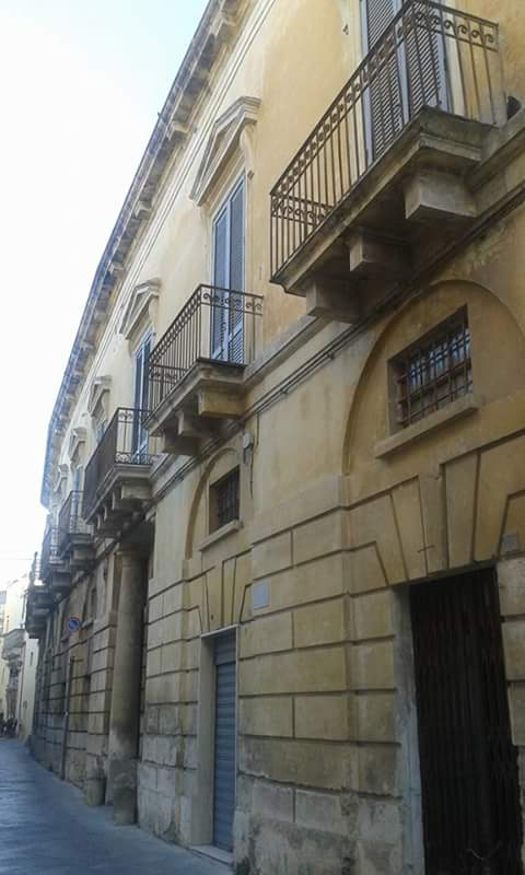 Palazzo Personè a Nardò (LE)-PUGLIA-ITALY